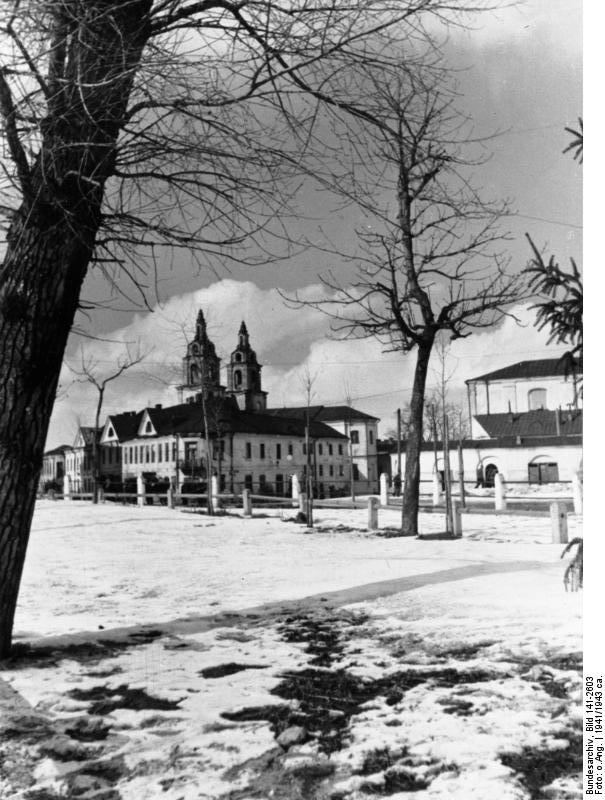 Russland, Minsk Sowjetunion, Minsk.- Blick auf die Türme der polnischen Kirche.